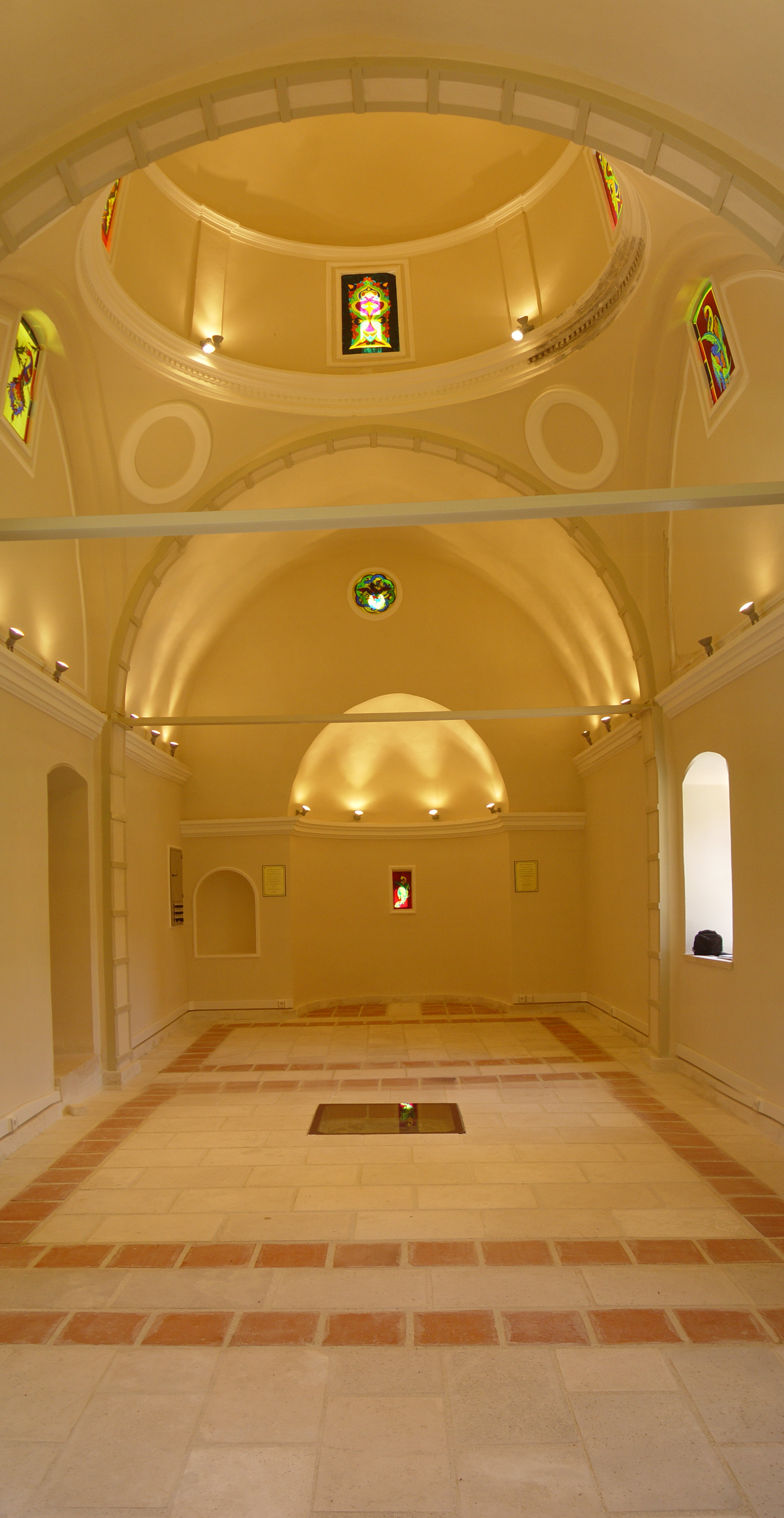 Kiliseye ait olan bu resim benim tarafımdan çekilmiştir. AKBÜK RUM ORTODOKS KİLİSESİ; Bina ,1870 yılında tek nefli ,ortada kubbe yanlarda ise tonoz örtülü olarak yapılmıştır.1893 yılında ise mevcut portal kapısı ve duvarı yapılmıştır; ancak , portal dışında bahçede orijinal bahçe duvarı izine rastlanamamıştır. Yapı bir çok dönemde farklı fonksiyonlarda kullanılmıştır. 1950 de Akbük Kazıklı Nahiyesi nin mahallesi olmuştur. Aynı yıl Kilise Camii olarak kullanılmaya başlanılmıştır. 1955 de Akbük Kazıklı Nahiyesinden ayrılıp müstakil köy kimliğine girmiştir. 1957 den 1975 e kadar ilk okul olarak hizmet vermiştir. 1975 den itibaren 2006 yılına kadar geçen 31 yıllık süreçte kaderine terk edilerek sahipsiz ve define avcılarının acımasız darbelerine dayanmaya çalışmış olup; 2006 yılında Belediye Başkanı; Sayın İBRAHİM ŞAM ın sahiplenmesi ve çabalarına Ani Anıtsal Yapıları Koruma Ltd.Şti ve Mimar M.Fikri AKTAN ın özverili çalışmaları eklenerek , Haziran 2007 tarihinde restore edilerek, KÜLTÜR MERKEZİ Olarak yeniden hizmete girmiştir. FİKRİ AKTAN M